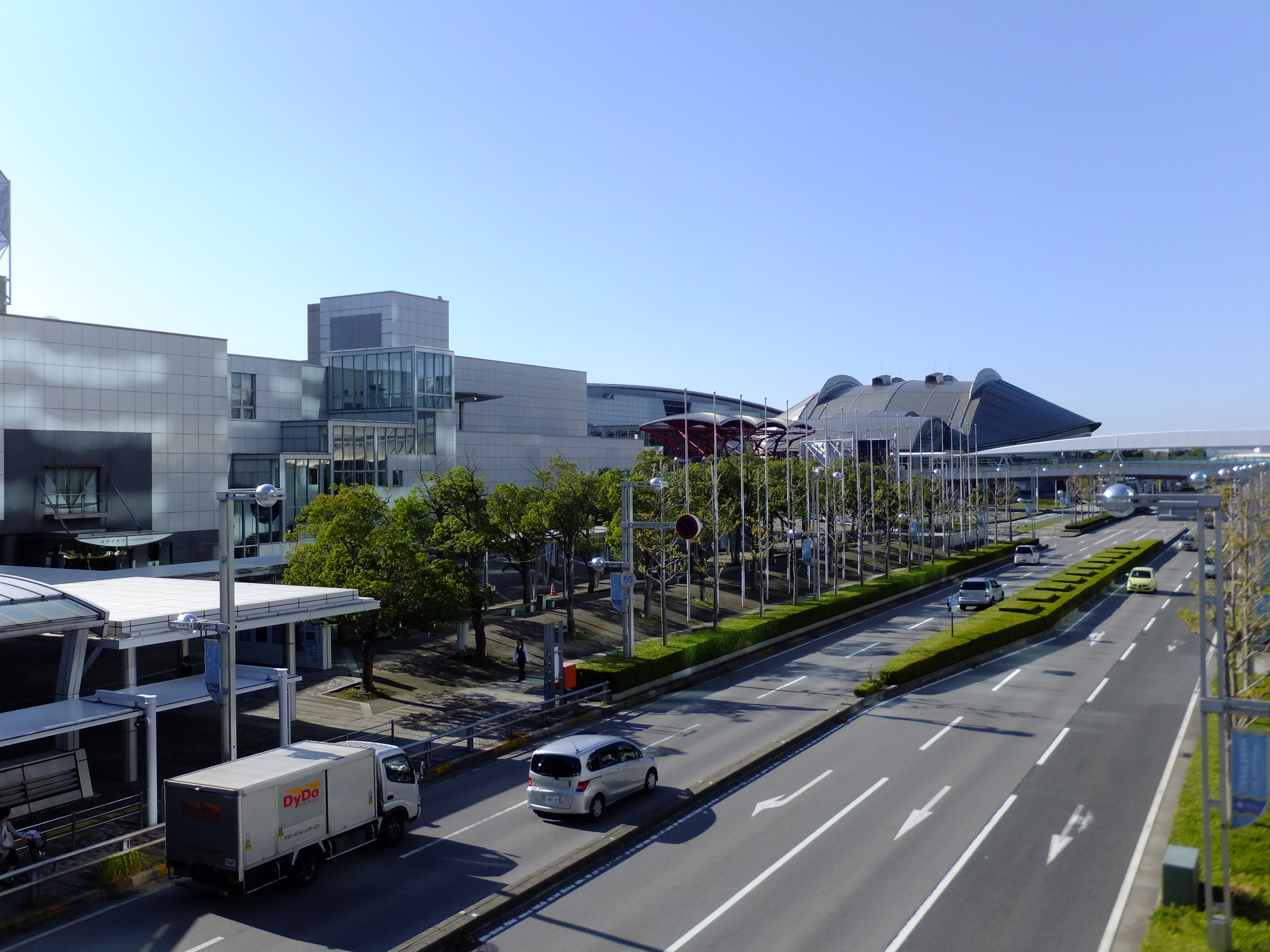 幕張新都心、メッセ大通り